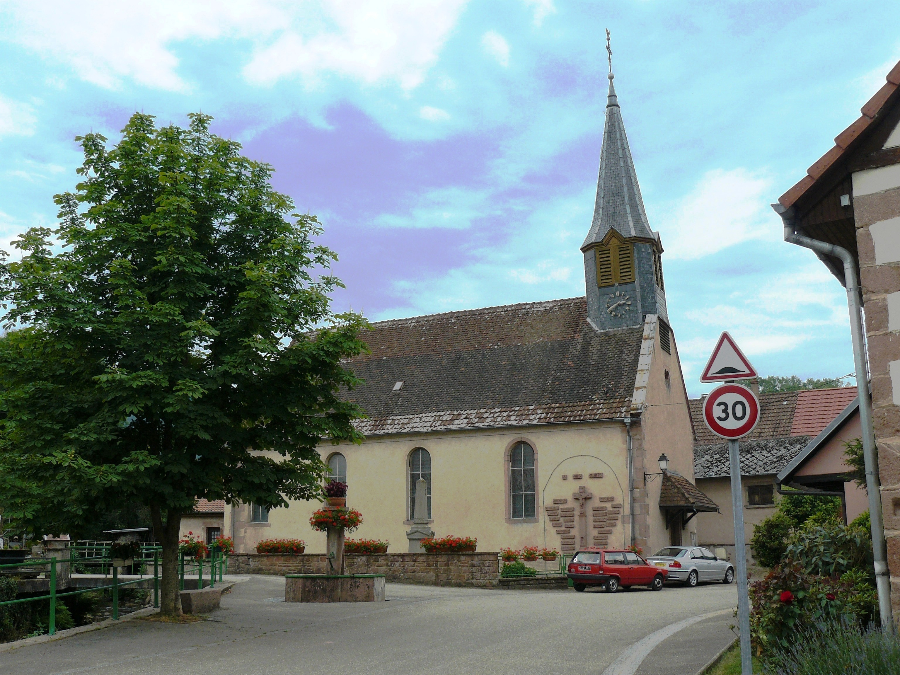 Eglise Saint-Quirin, Bassemberg, France